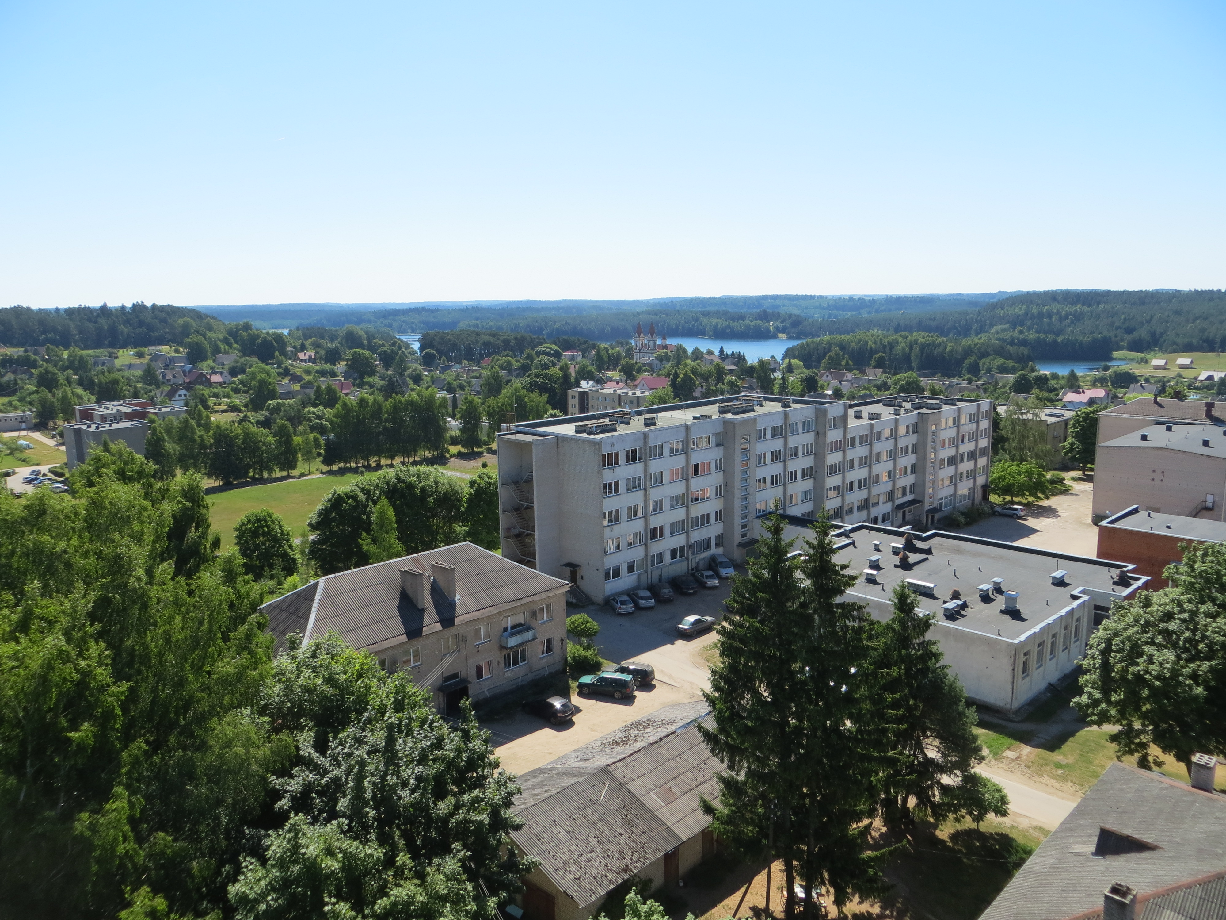 Aukštadvaris, Lithuania